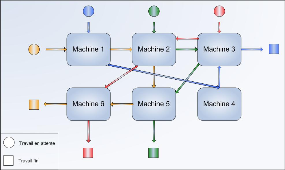 Configuration d'un Atelier à Cheminement Multiple, par Younes